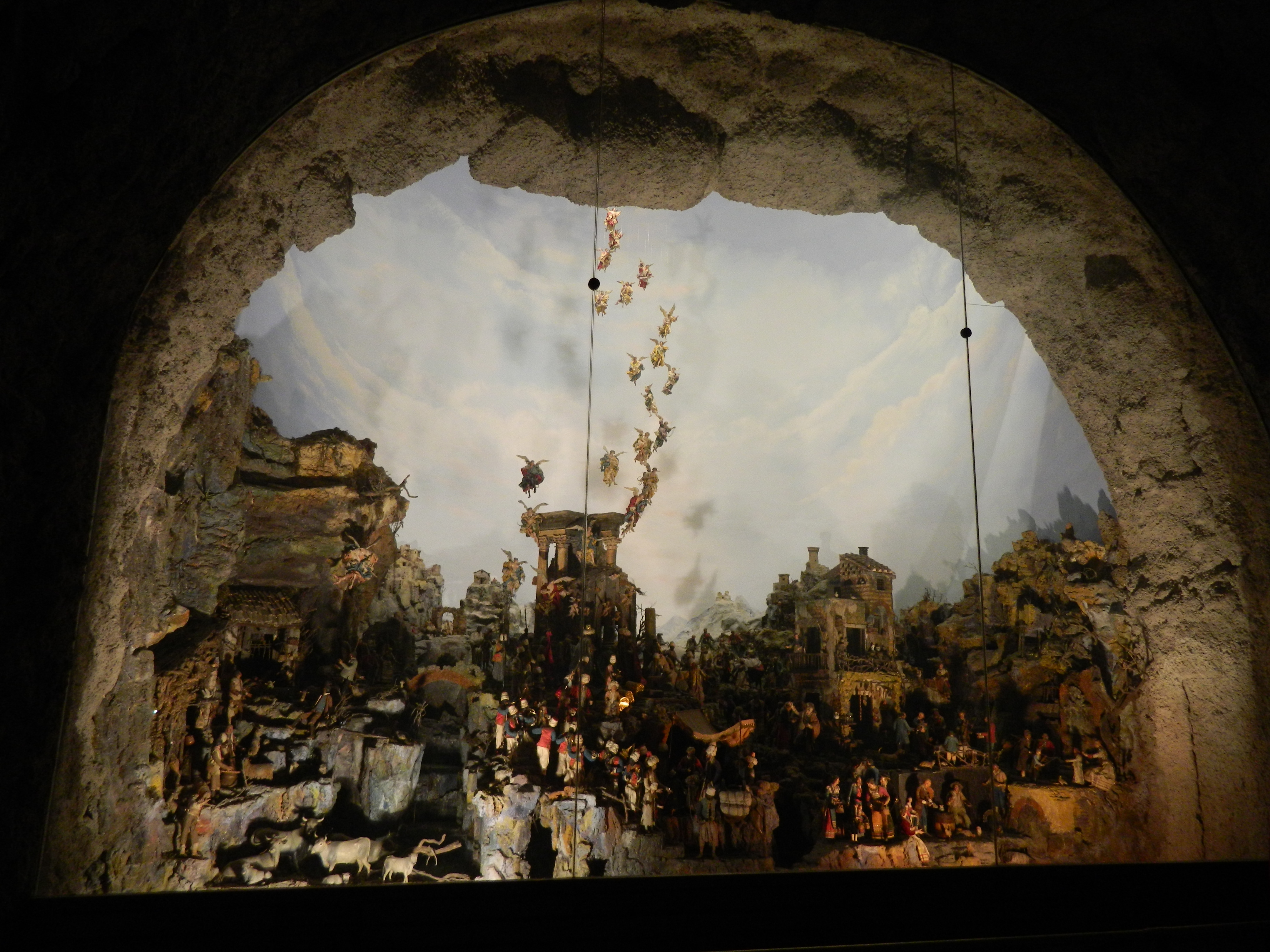 Presepe Cuciniello - Museo nazionale di San Martino, Napoli